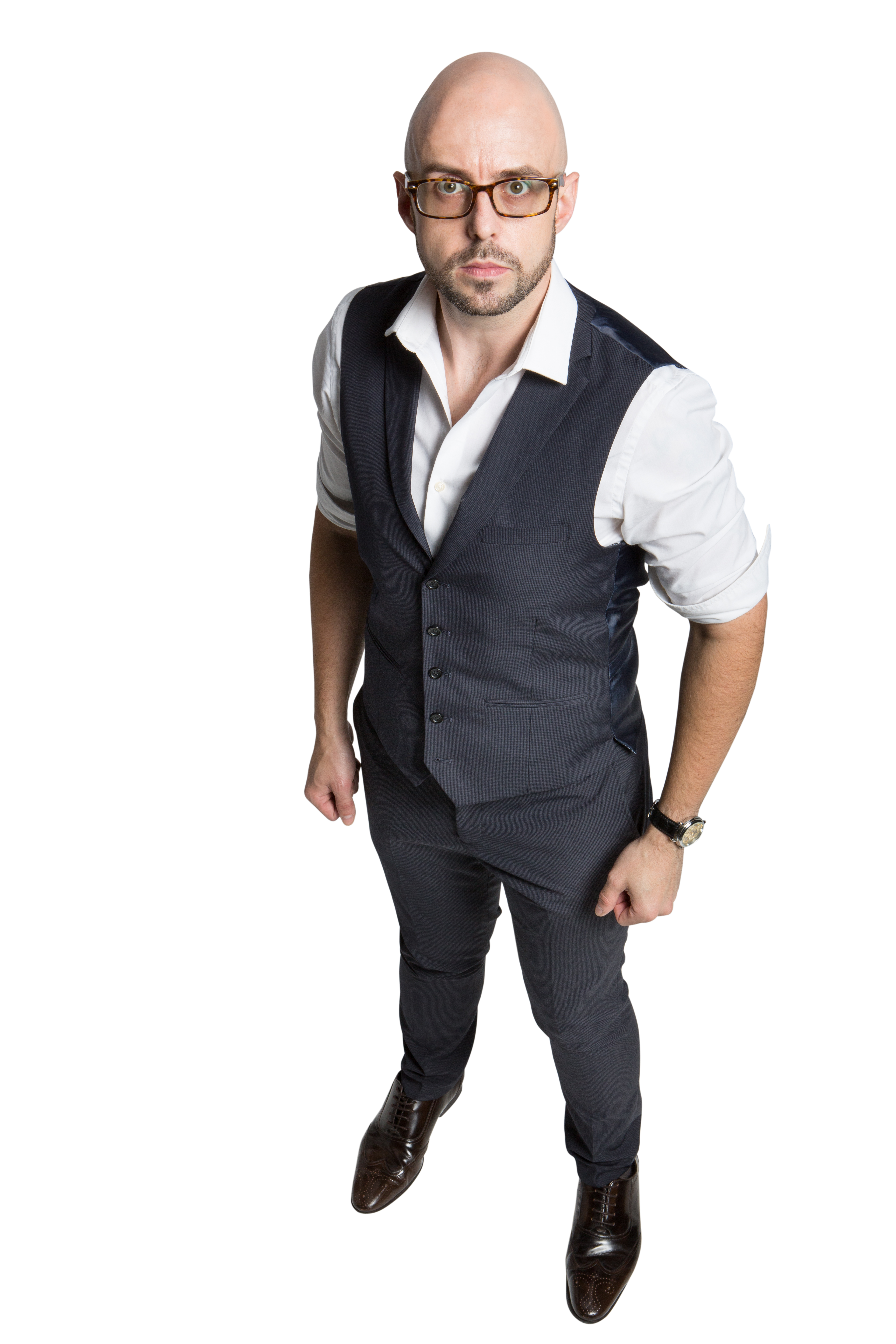 Paul Brook